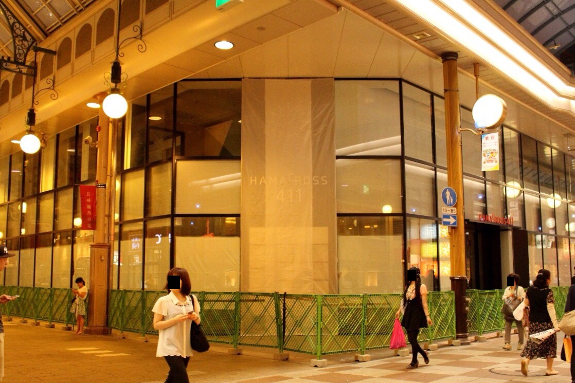 ハマクロス411